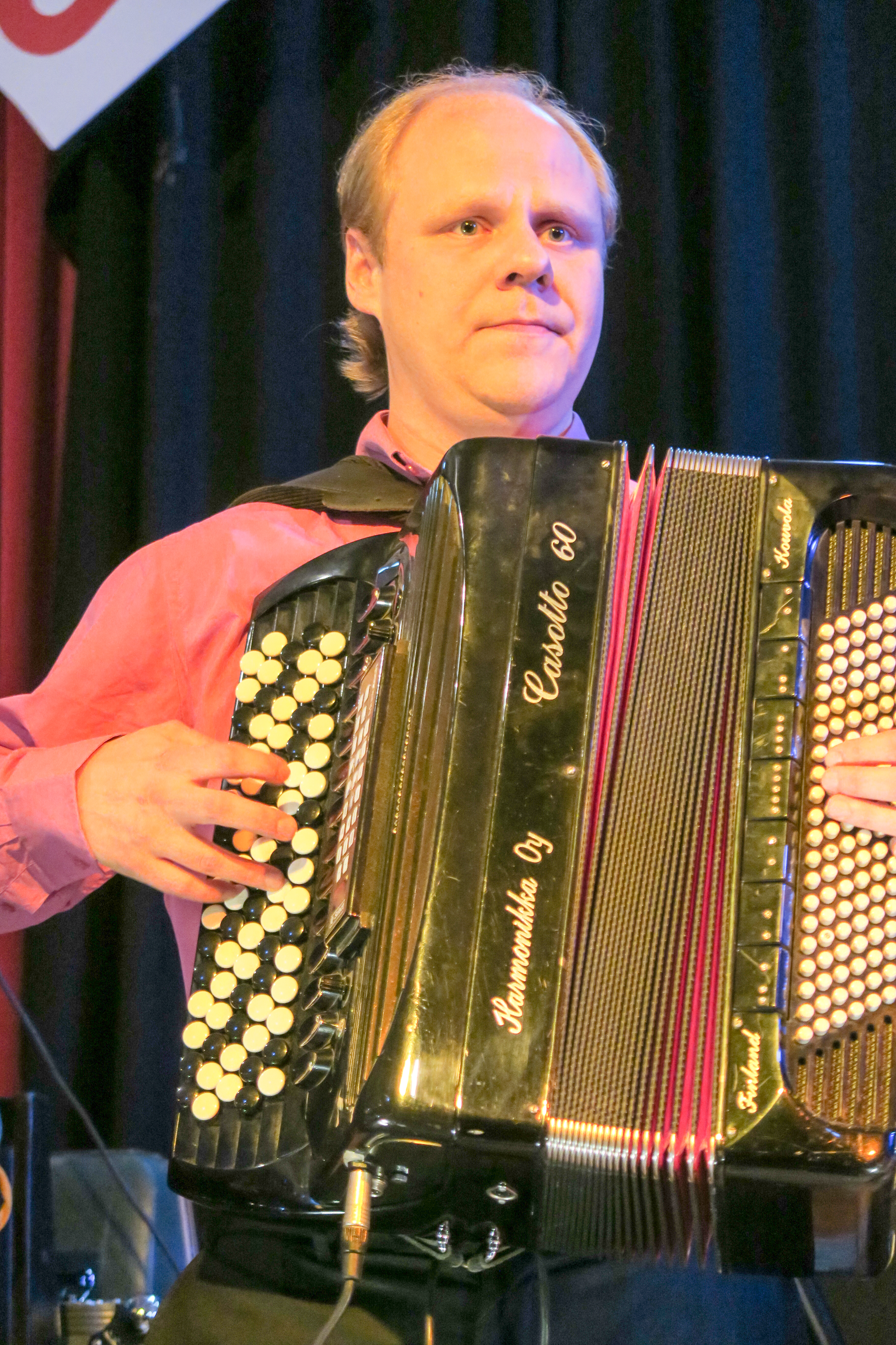 Jani Helenius